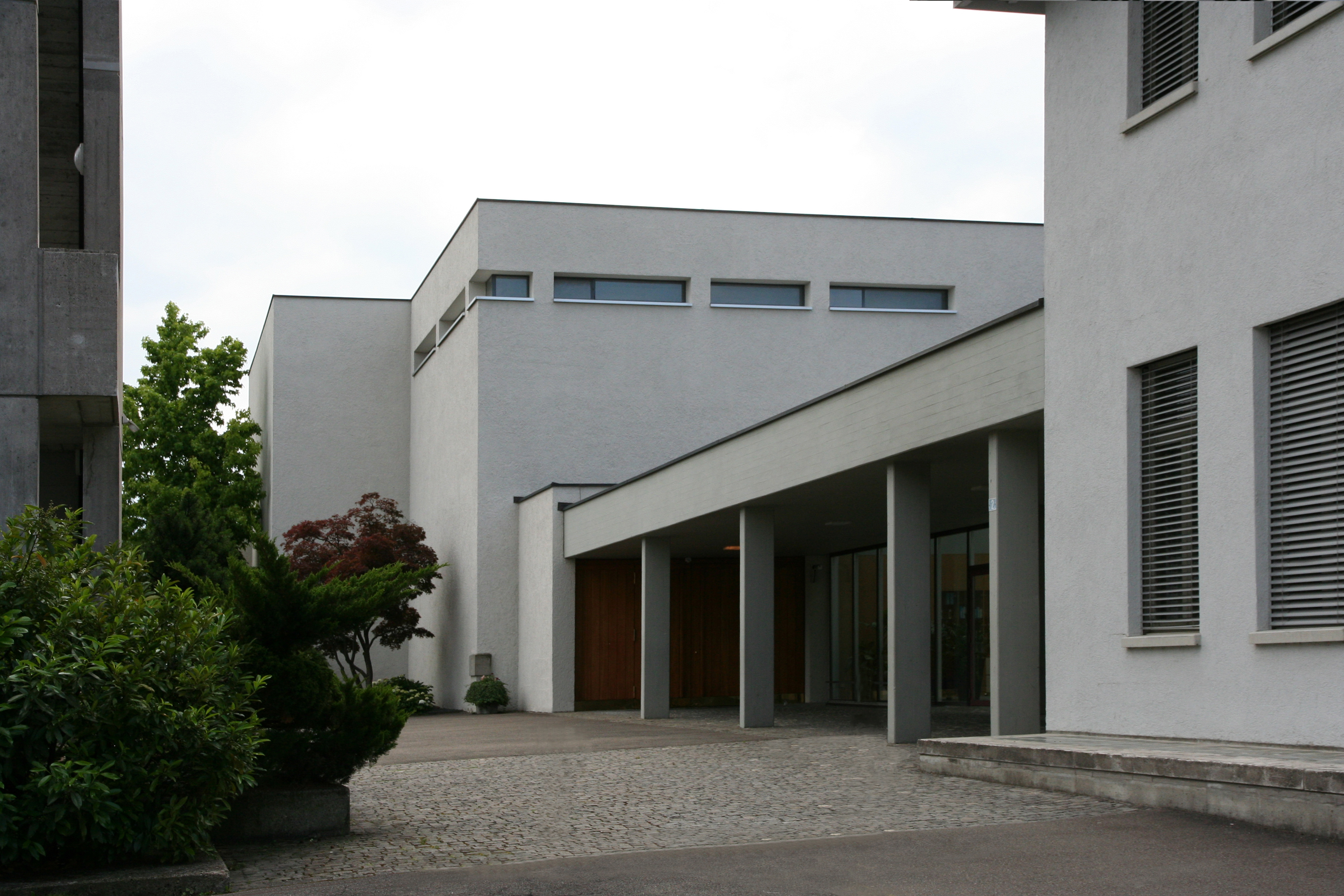 Römisch-katholische Pfarrkirche Dreifaltigkeit Rüti ZH, Eingang zur Kirche